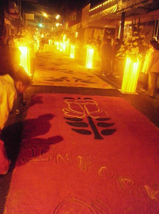 Muestras artísticas de los tapetes realizados en Uriangato, Gto.